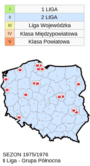 Jagiellonia w sezonie 1975/76 - mapa